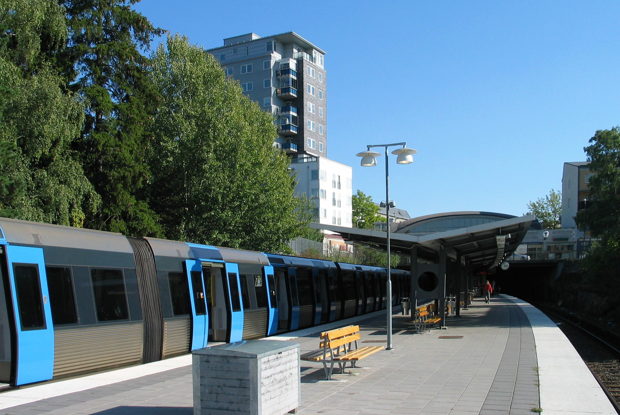 Blackeberg, a metro station in Stockholm, Sweden.